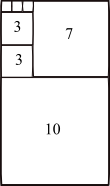 pavage illustrant une fraction continue. Image personnelle